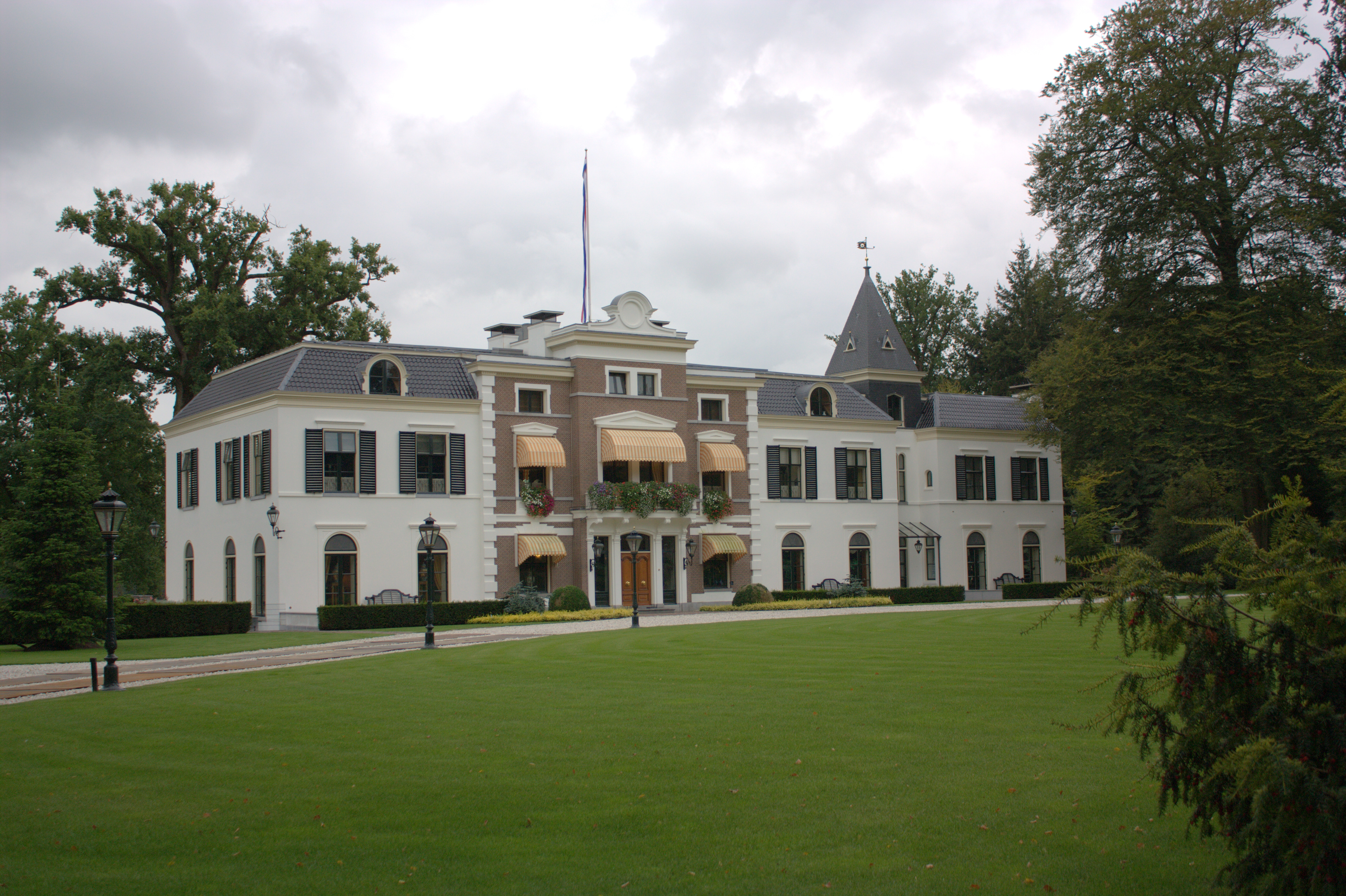 Het landhuis Den Treek